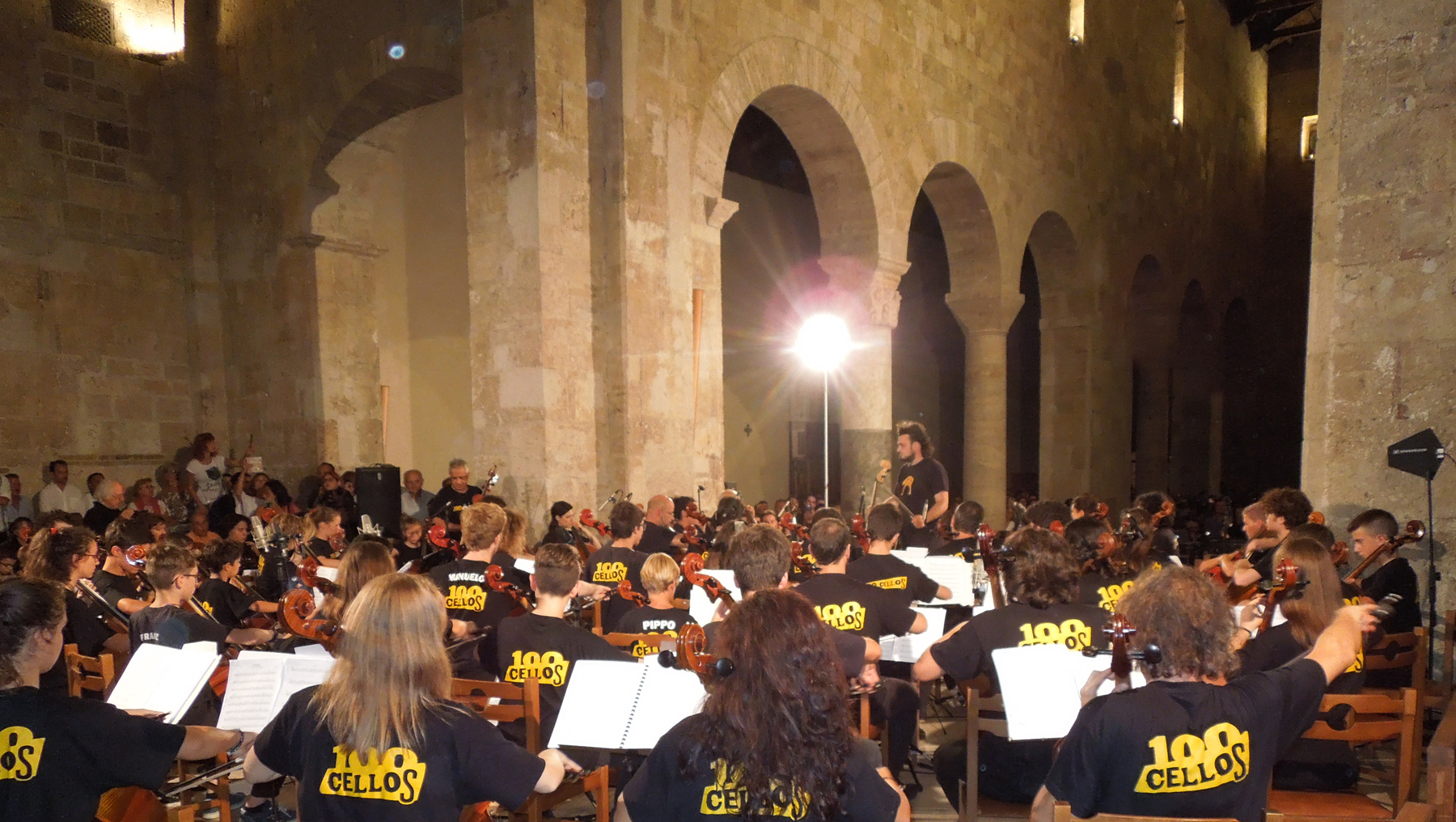 Enrico Melozzi, compositore, direttore d'orchestra, produttore discografico polistrumentista e arrangiatore italiano. Immagine scattata all'interno del Duomo di Teramo durante il Concerto dei 100 Cellos il giorno 1 settembre 2018.